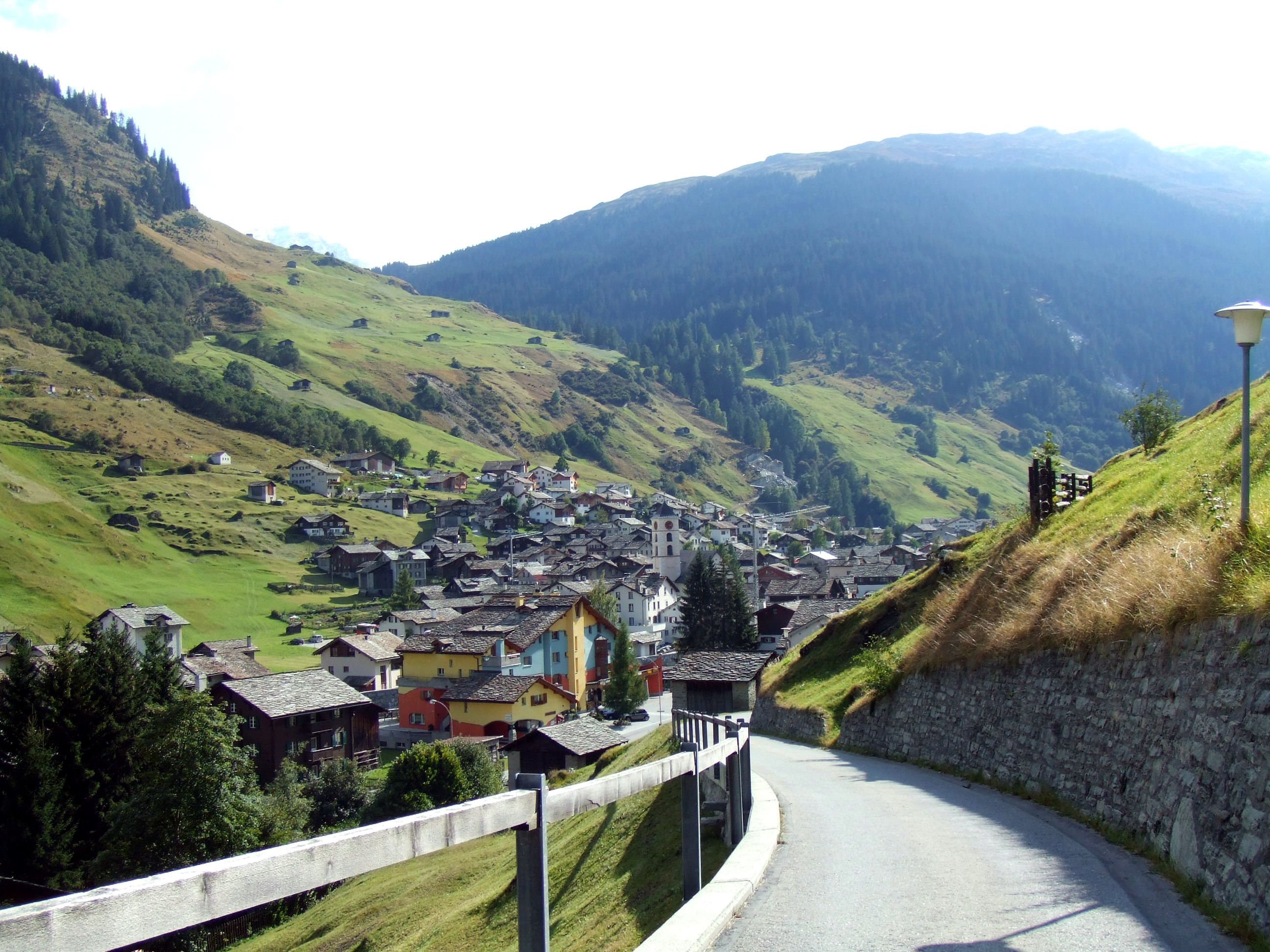 Vals, Graubünden